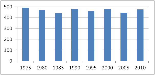 Demografi Geta, Åland